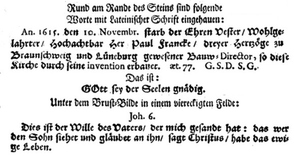 Inschriften des Epitaphs von Paul Francke (gest. 1615) in der Wolfenbütteler Marienkirche